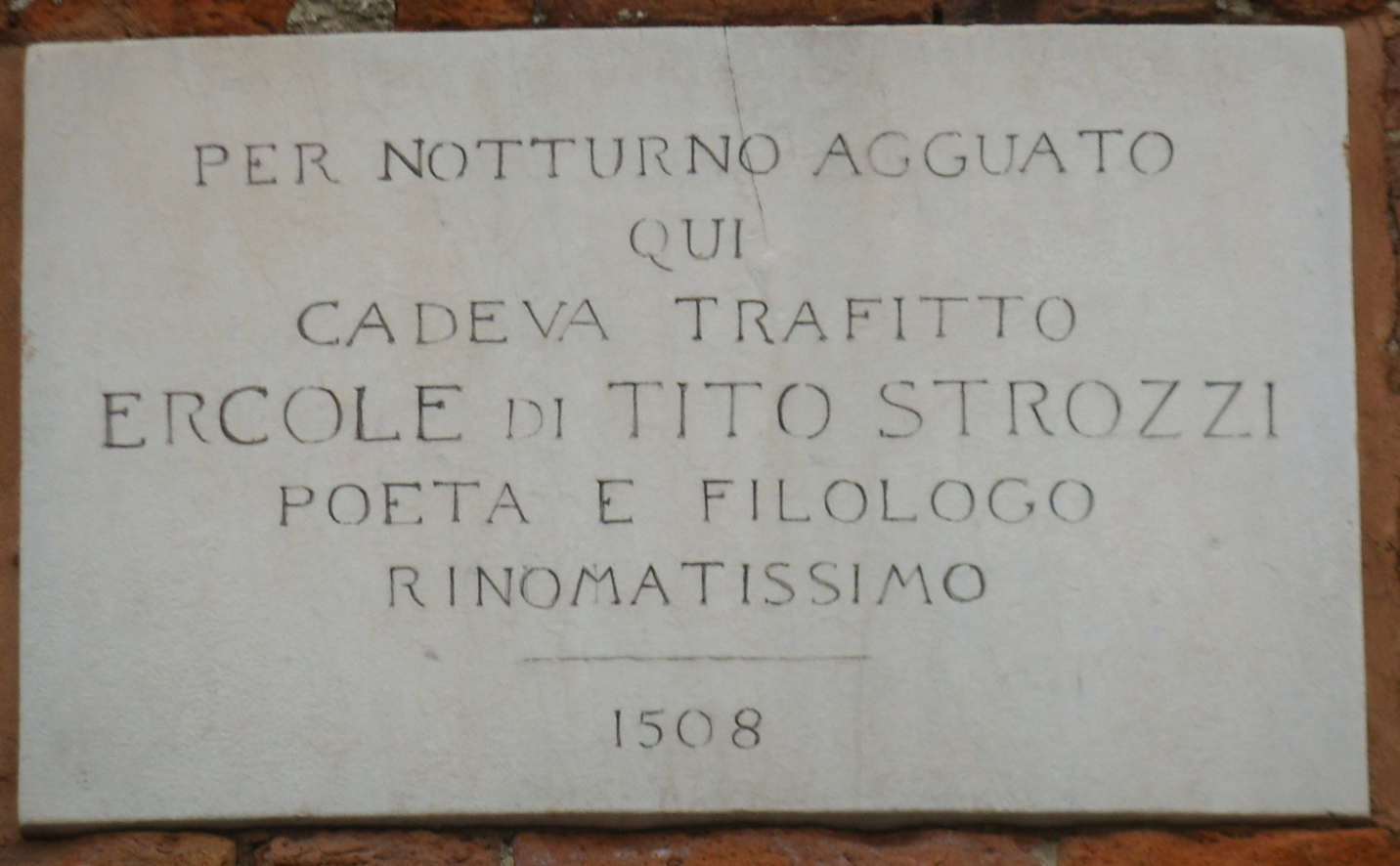 Ferrara, lapide ercole strozzi